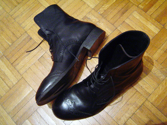 Дубоке ципеле